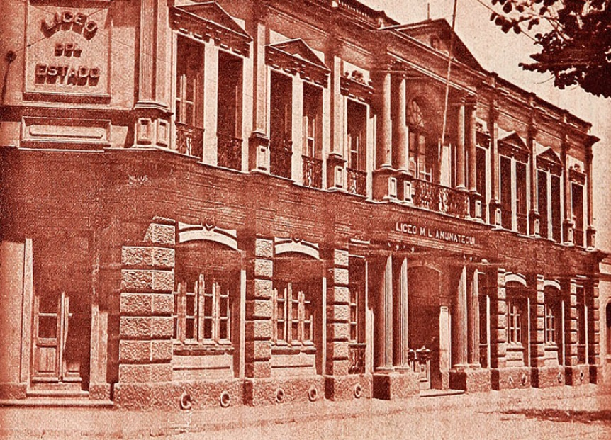 Fachada del Liceo Miguel Luis Amunátegui en 1915.